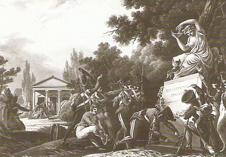 Żołnierze ranni pod Sandomierzem w r. 1809, wyleczeni w Puławach, składają kule inwalidzkie pod pomnikiem w parku